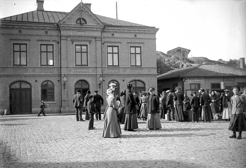 depicted place: Bohuslän, Västra Götaland, Strömstad, Strömstad (Sverige (SE))